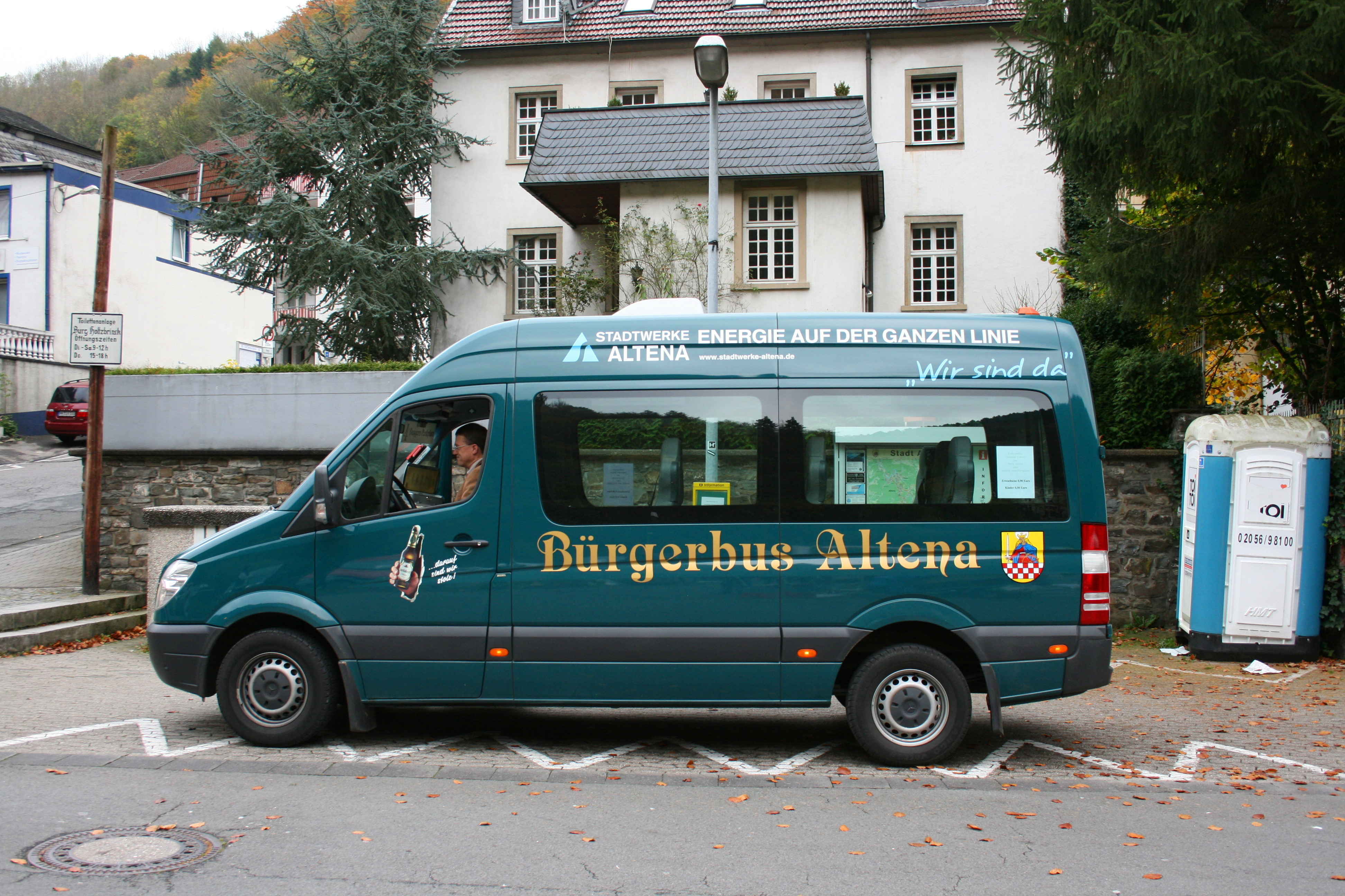 Lenneuferstraße in Altena